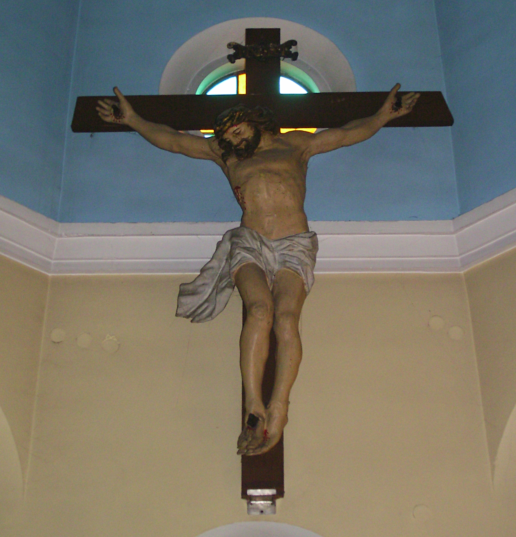 Monumentalny zabytkowy krucyfiks sprzed 1721 roku. Bączal Dolny (diecezja rzeszowska)